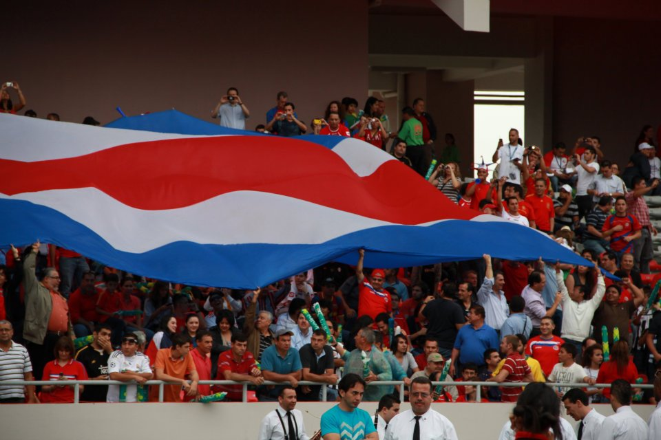 En un espectacular partido, la selección de fútbol de España empató ante la selección de fútbol de Costa Rica en el Estadio Nacional de Costa Rica. Ambos equipos anotaron dos goles, sin embargo España se llevó el espectáculo al anotar sus dos goles en los últimos minutos de partido.